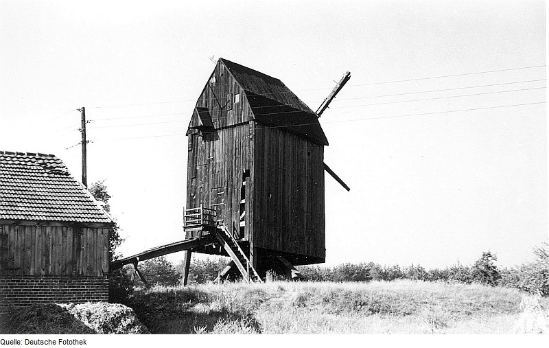 Original image description from the Deutsche Fotothek Genthin-Mützel. Kageler Mühle, Bockmühle, Baujahr 1815 (1815 umgesetzt von Scharteucke)